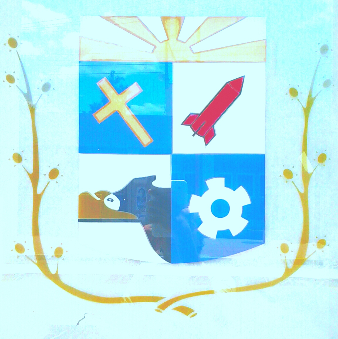 Escudo de Chamical, un municipio en La Rioja, Argentina.